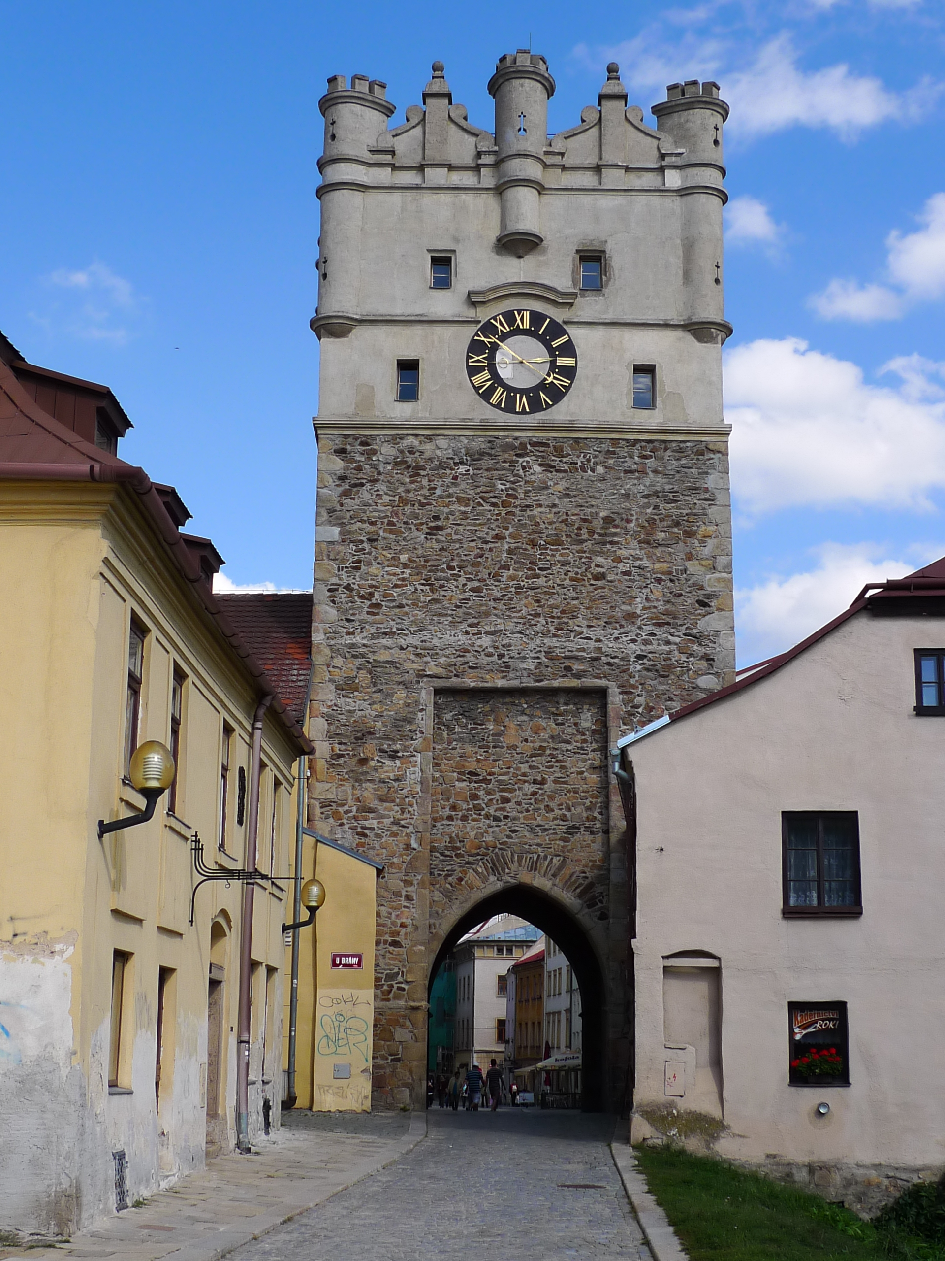 Městské opevnění (Jihlava), Jihlava